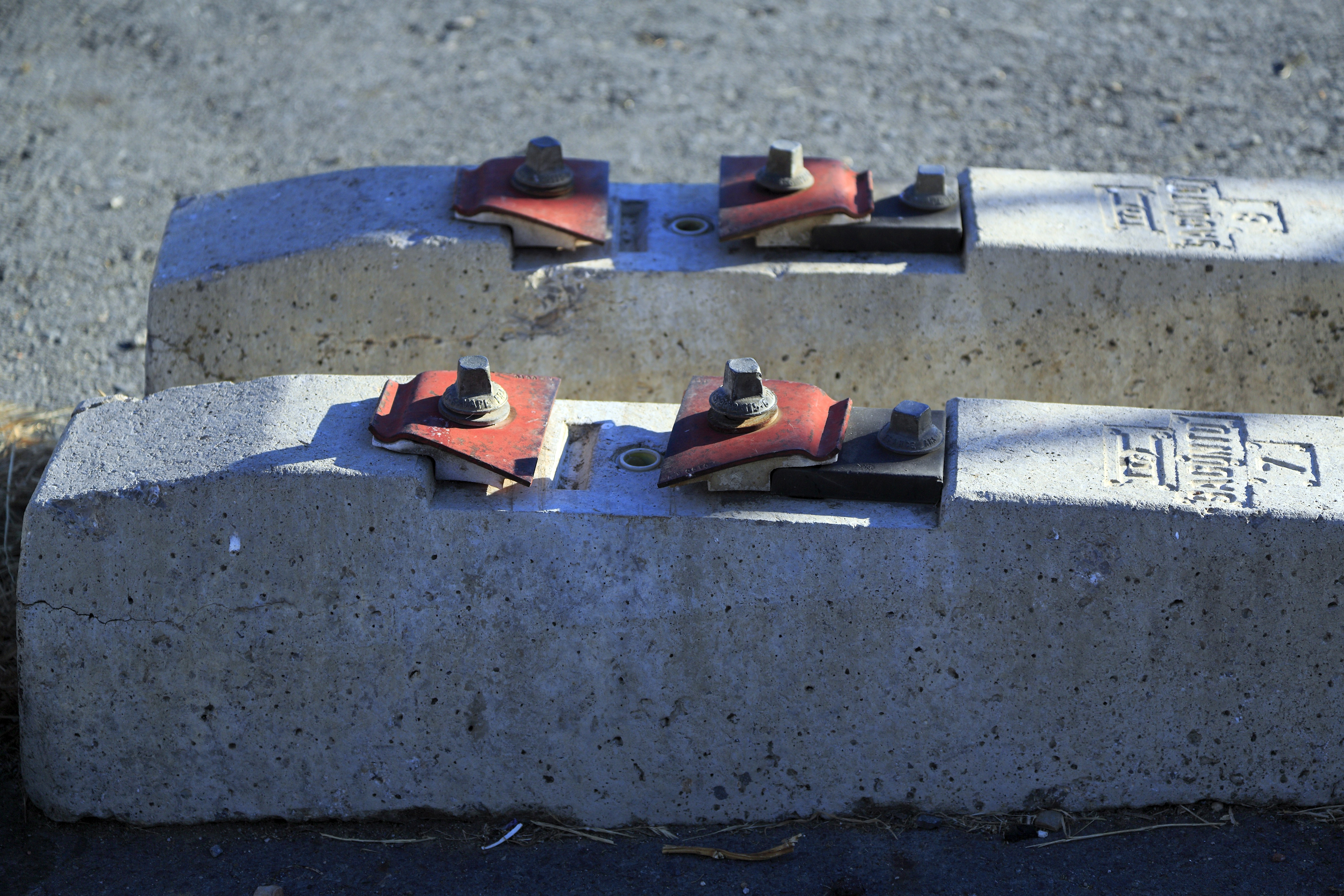 Diese Form mit der ursprünglich französischen Schienenbefestigung ist umspurbar relativ selten. Häufiger tritt sie in Spanien bei Zweiblockschwellen und in fester Fahrbahn auf. Das Kleineisen ist in Breitspurstellung vormontiert.Zum Umspuren werden die Schwellenschrauben und Befestigungsmittel entfernt und die schwarzen Distanzstücke um 180° gedreht und auf der Außenposition befestigt. Die Befestigungsmittel rücken damit nach innen, die Spurweite ändert sich auf Regelspur. Die Umspurung kann auch im liegenden Gleis vorgenommen werden.Zwischen Schienenfuß und Beton gehört eine Kunststoffzwischenlage, diese fehlt hier.